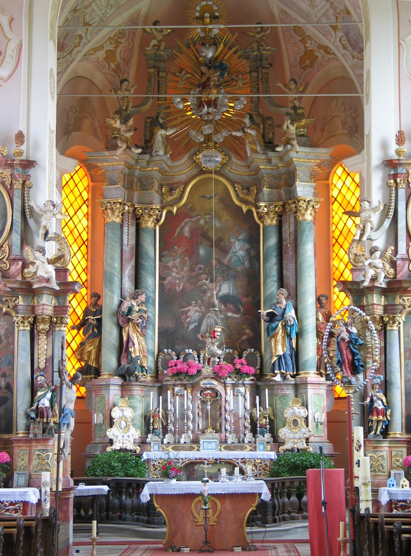 Thürnthenning, Kath. Filialkirche St. Johannes Nepomuk. Hochaltar.